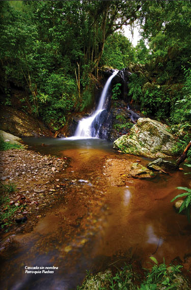 Cascada Sin Nombre en la parroquia Pidras, Piñas.